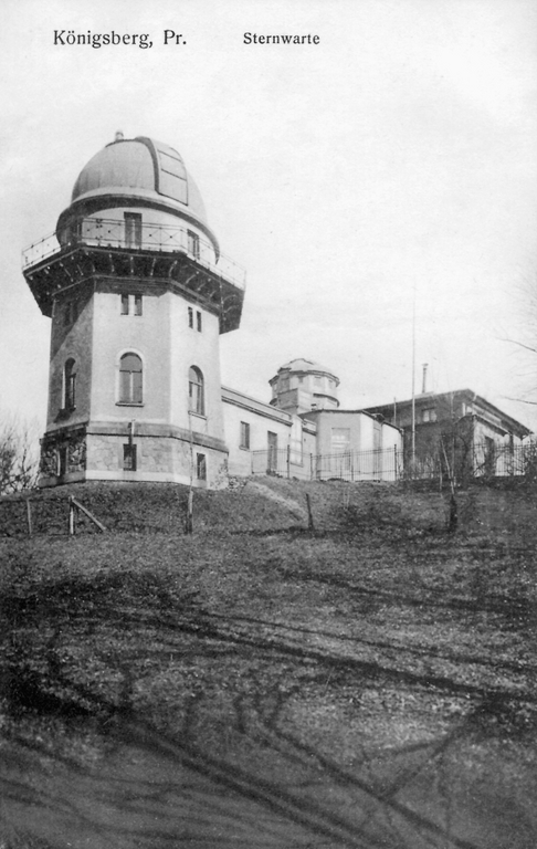 Königsberg